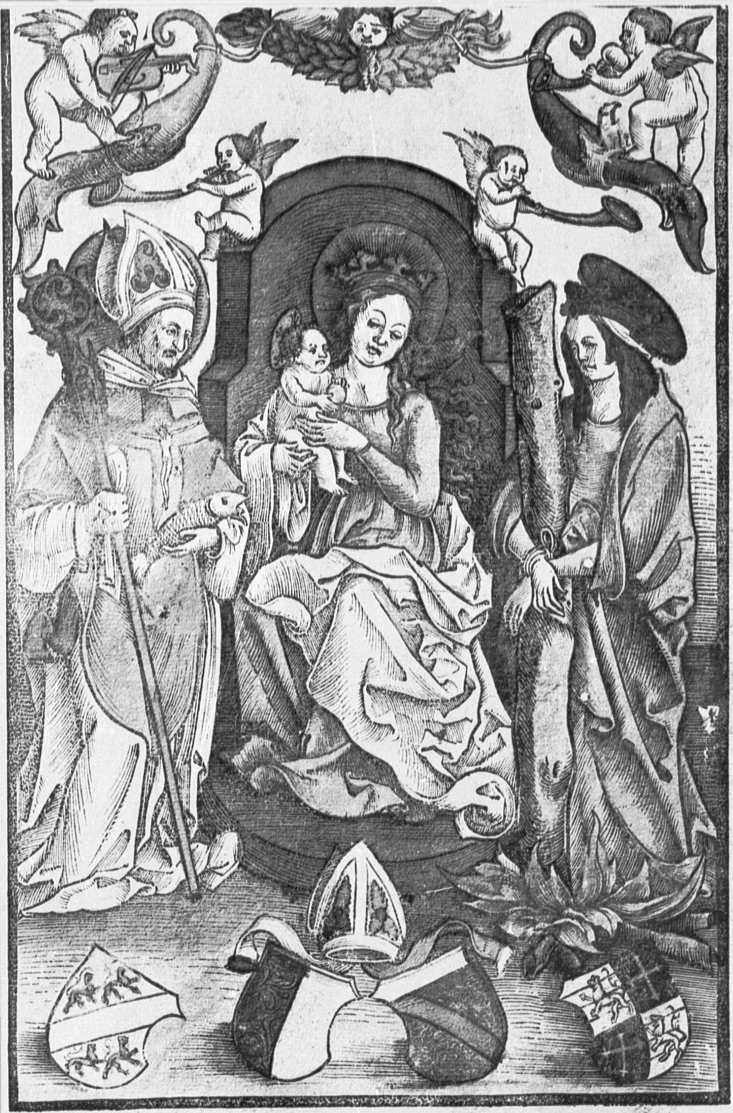 Madonna zwischen den Heiligen Ulrich und Afra, mit den Wappen des Augsburger Bischofs Heinrich IV. von Lichtenau (1505–1517)